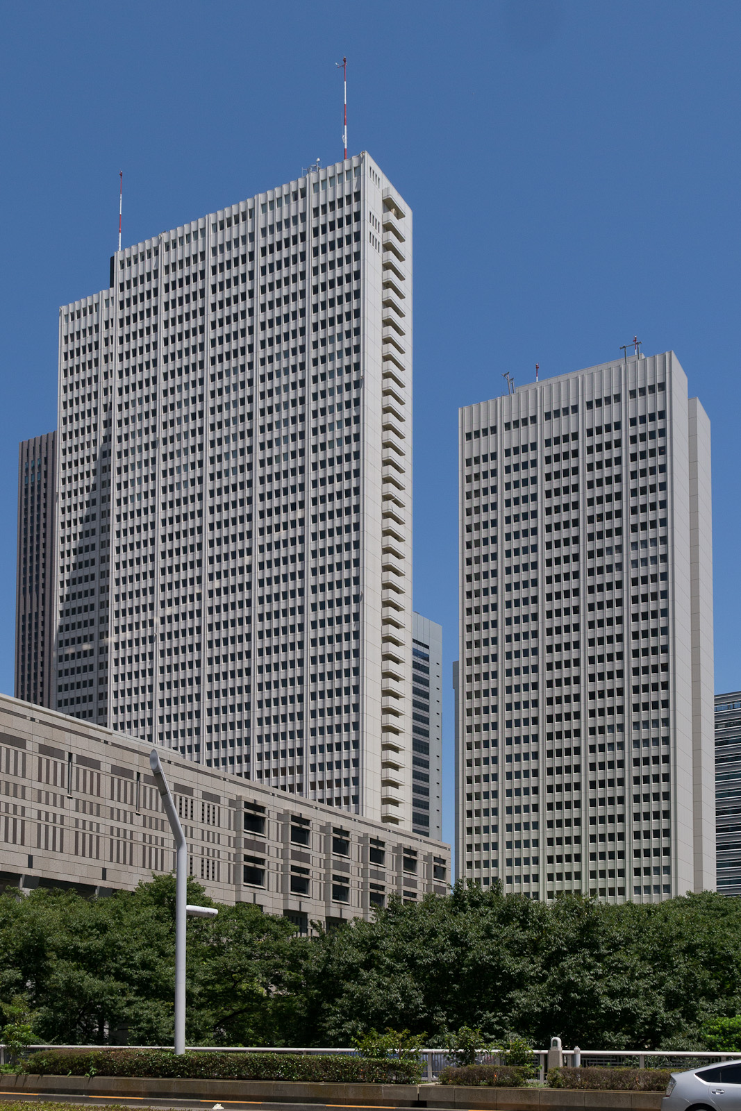 新宿「京王プラザホテル」。